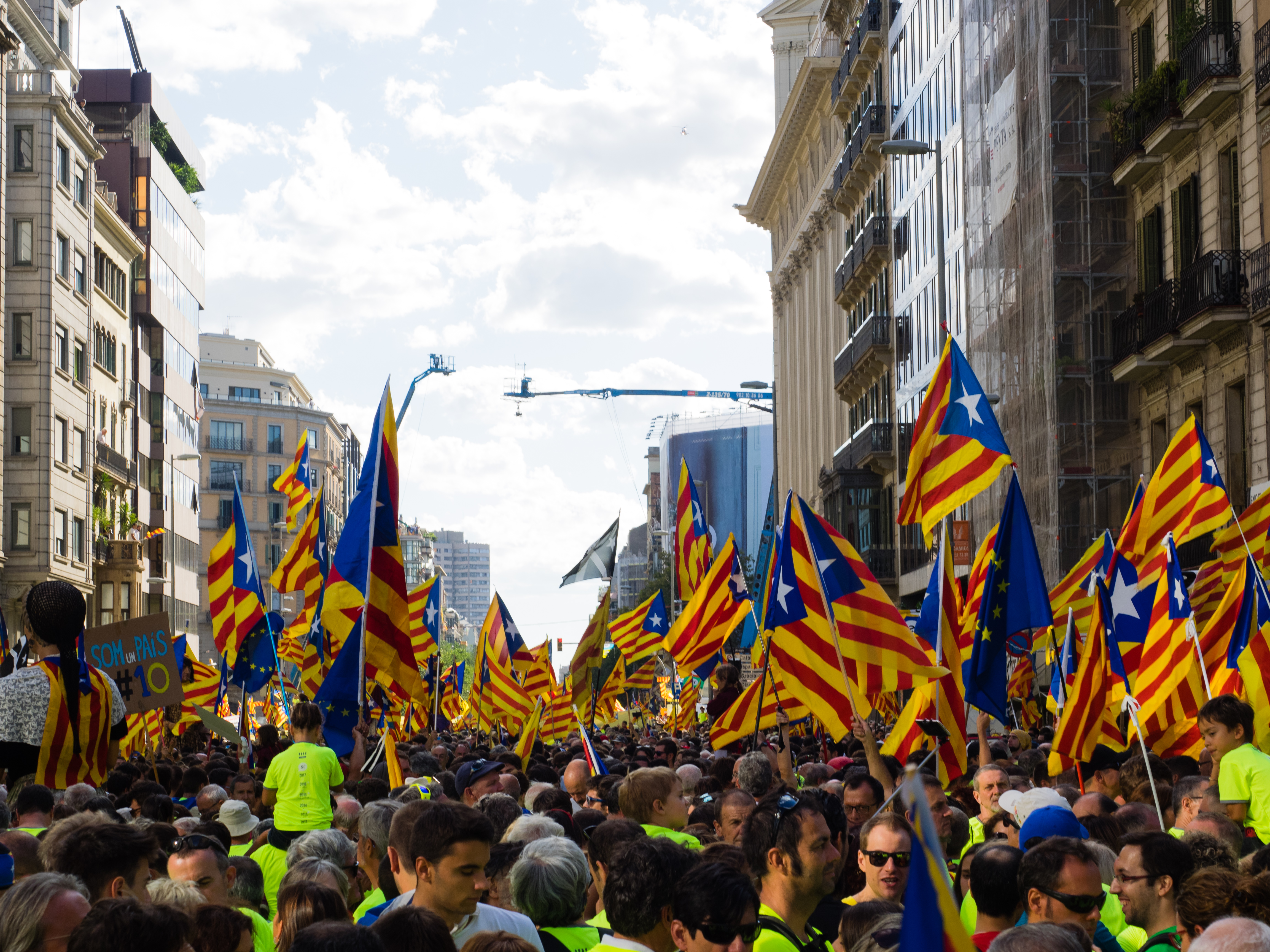 La manifestació Diada del Sí es va celebrar l'11 de setembre de 2017 a Barcelona.